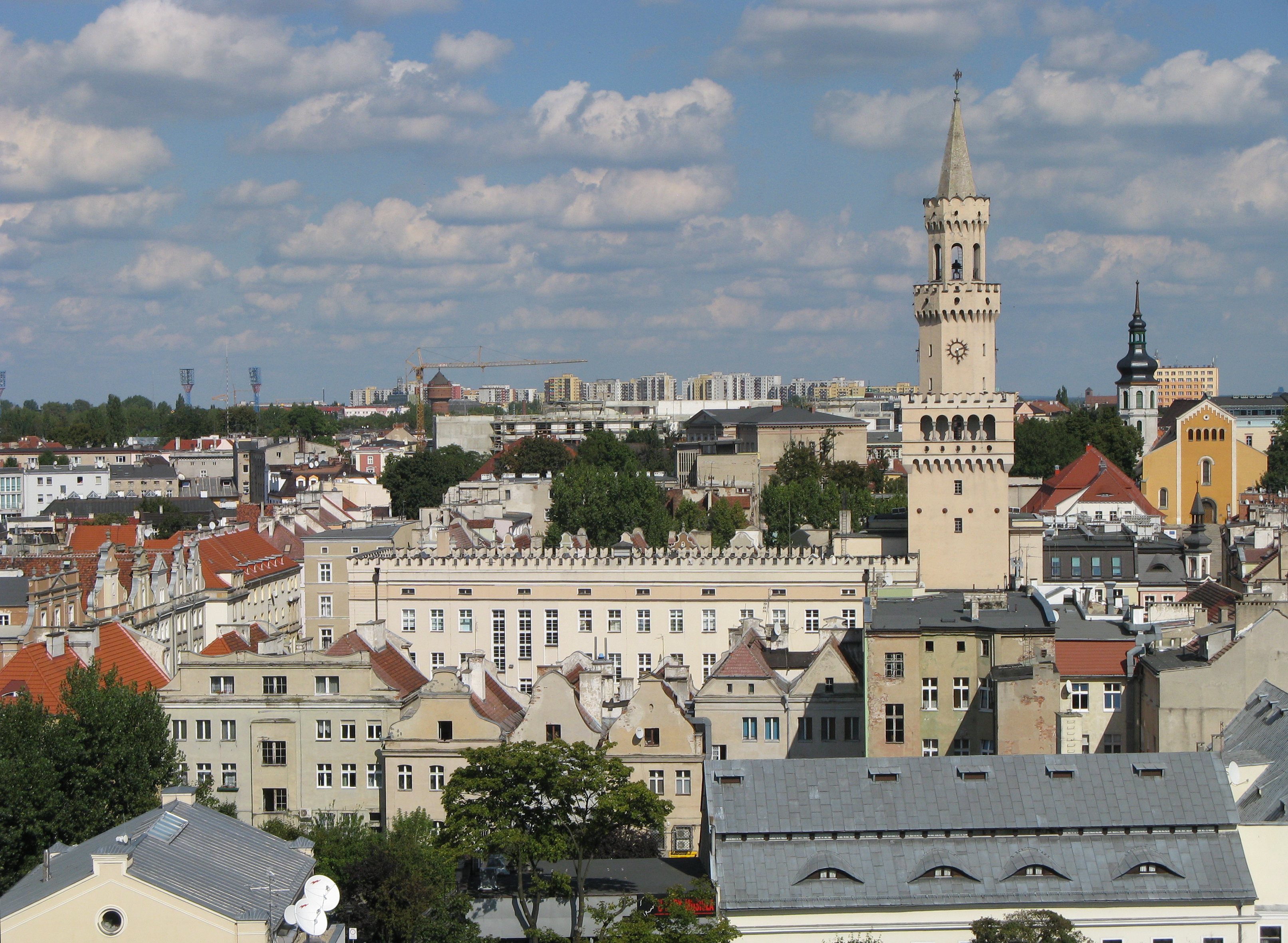 Ratusz w Opolu - widok z Wieży Piastowskiej